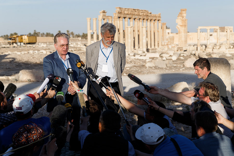 Работа зарубежных СМИ в городе Пальмире во время концерта «С молитвой о Пальмире»